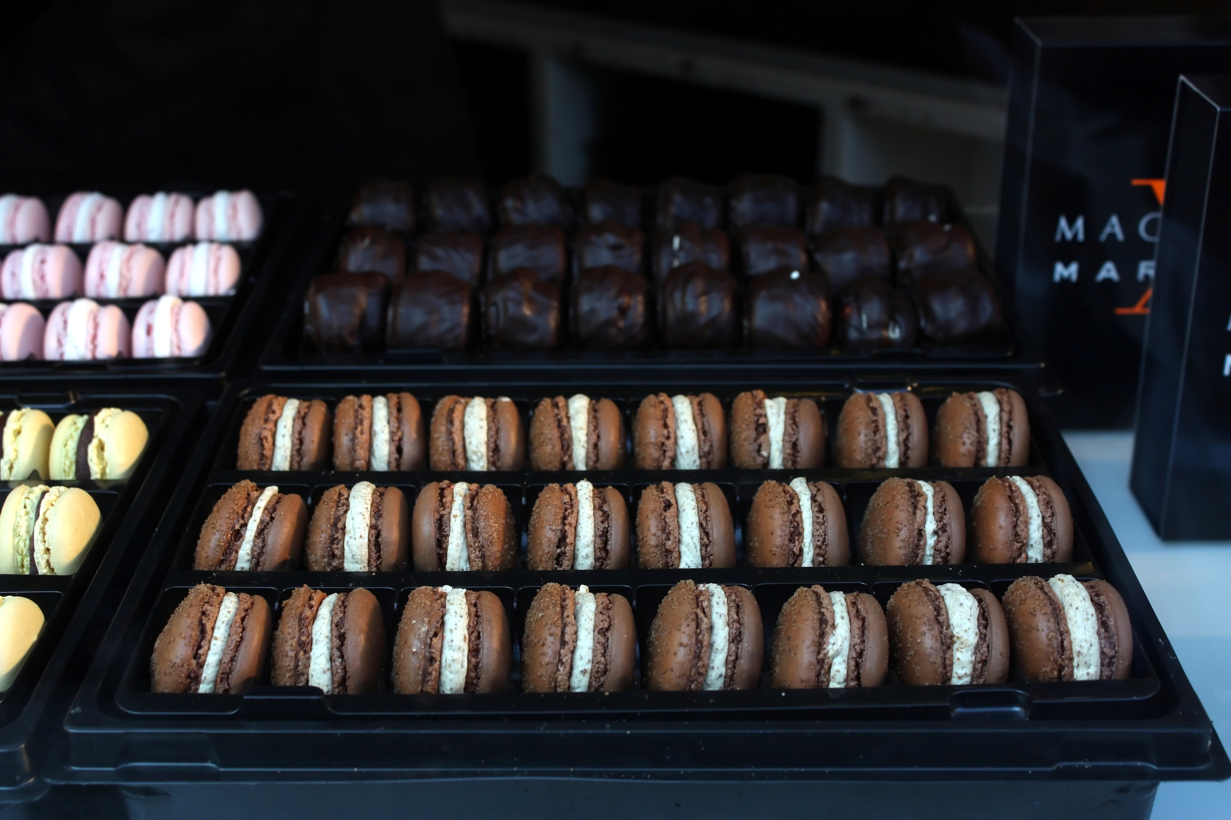 Macarons exposé en vitrine d'un magasin Pierre Marcolini.